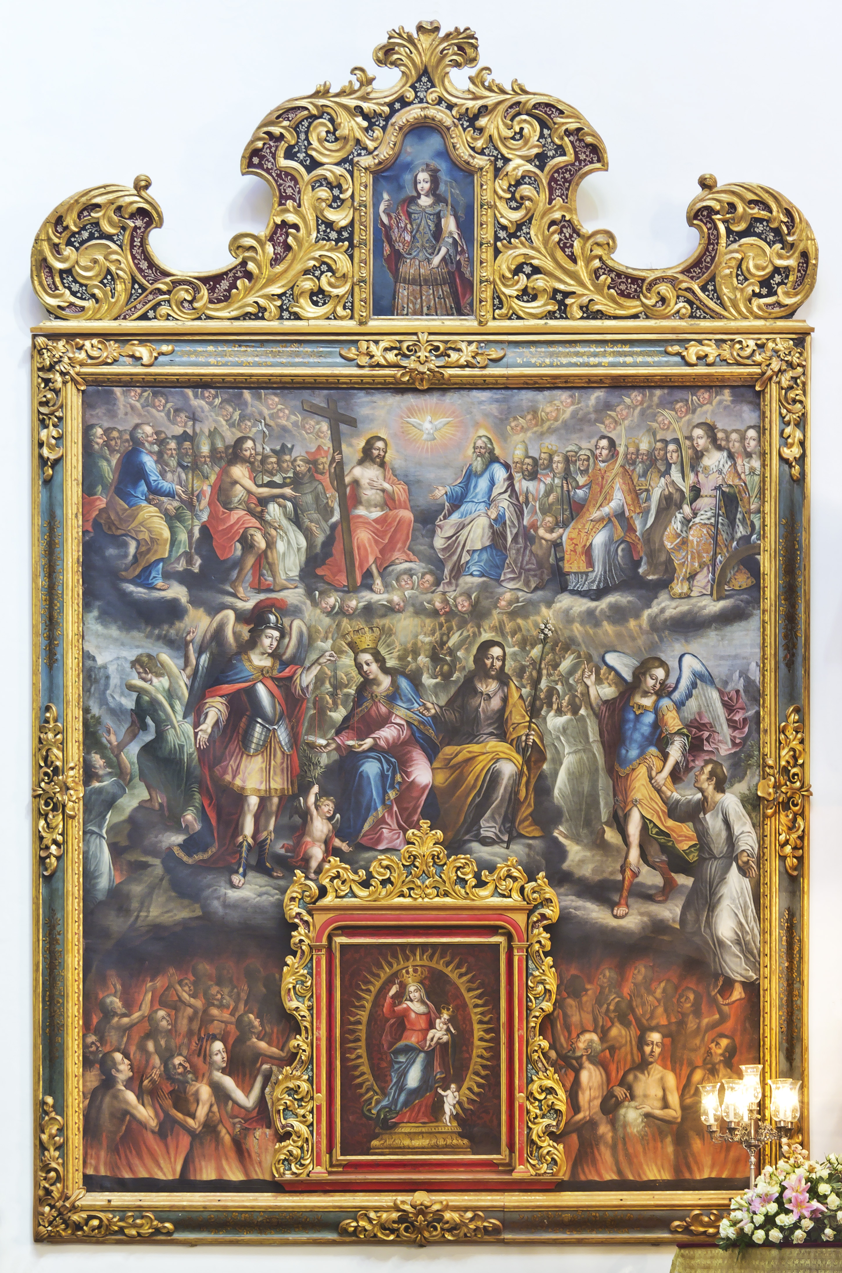 Das Jüngste Gericht in der Kathedrale in La Laguna. Der Autor ist Cristóbal Hernández de Quintana